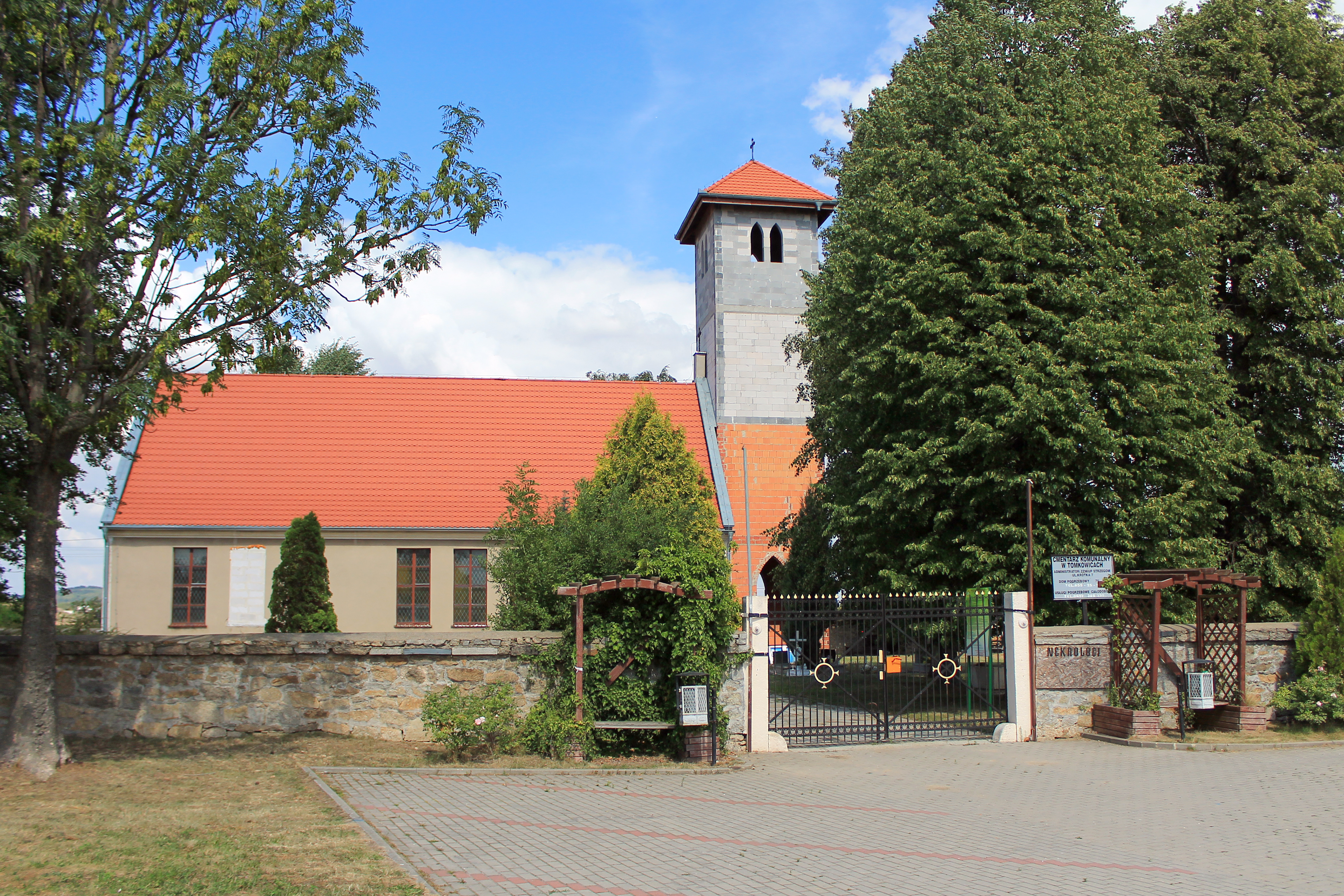 Tomkowice, gmina Strzegom. Kościół katolicki filialny błogosławionej Karoliny Kózkówny.